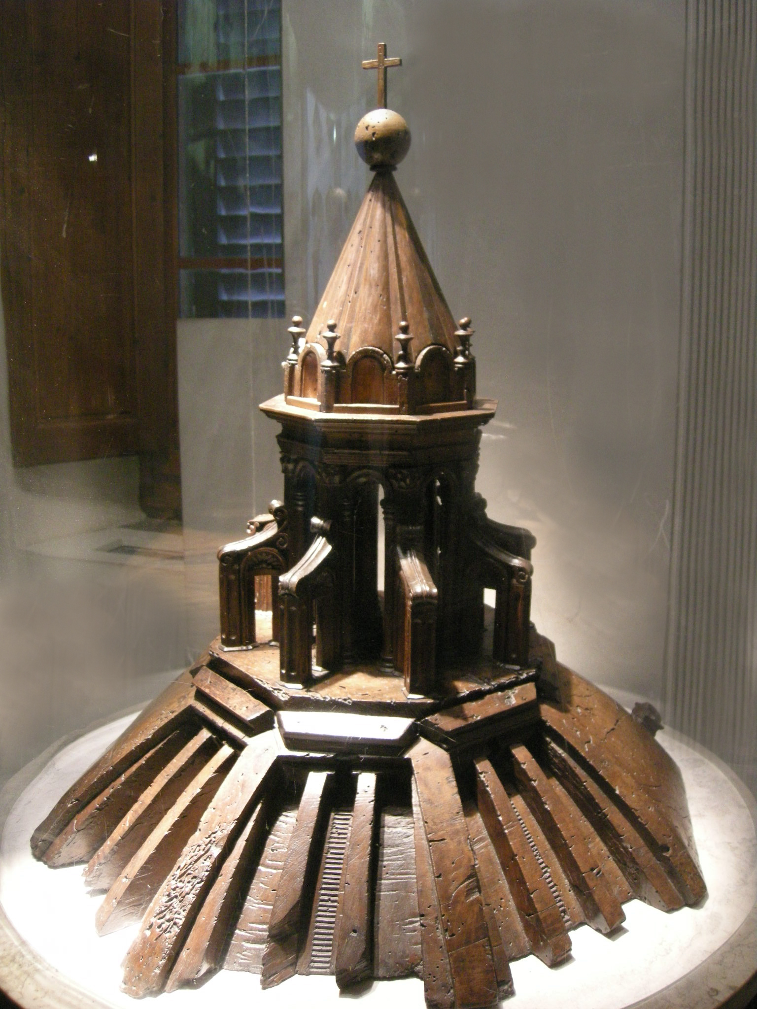 Progetto ligneo per la lanterna, 1673